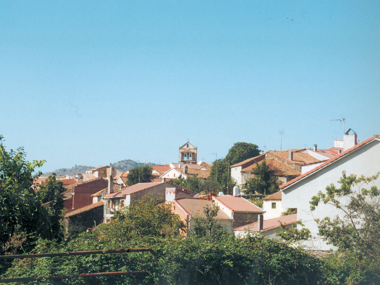 Vista general de Montejo de la Sierra.